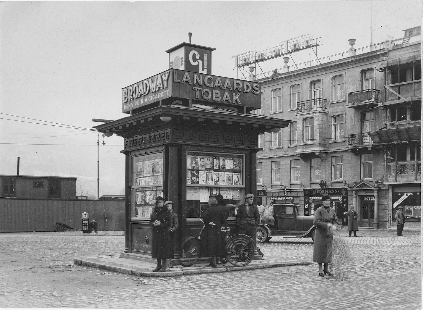 Fotograf: ukjent År: ukjent Arkivreferanse: Riksarkivet, PA-1522 Narvesen. Gamle kiosker fra hele Norge, Ud_120 Beskrivelse: Utallige varianter av Narvesenkiosker har preget jernbanestasjoner, byer og tettsteder i Norge. Her "Tyrihans-kiosk" fra Bragernes torg i Drammen. "Tyrihans" ble tegnet av arkitektene Carl Buch og Lorenz Harboe Ree. "Tyrihans" vakte oppmerksomhet med sine elegante detaljer, rosetter og søyler i hjørnene Url